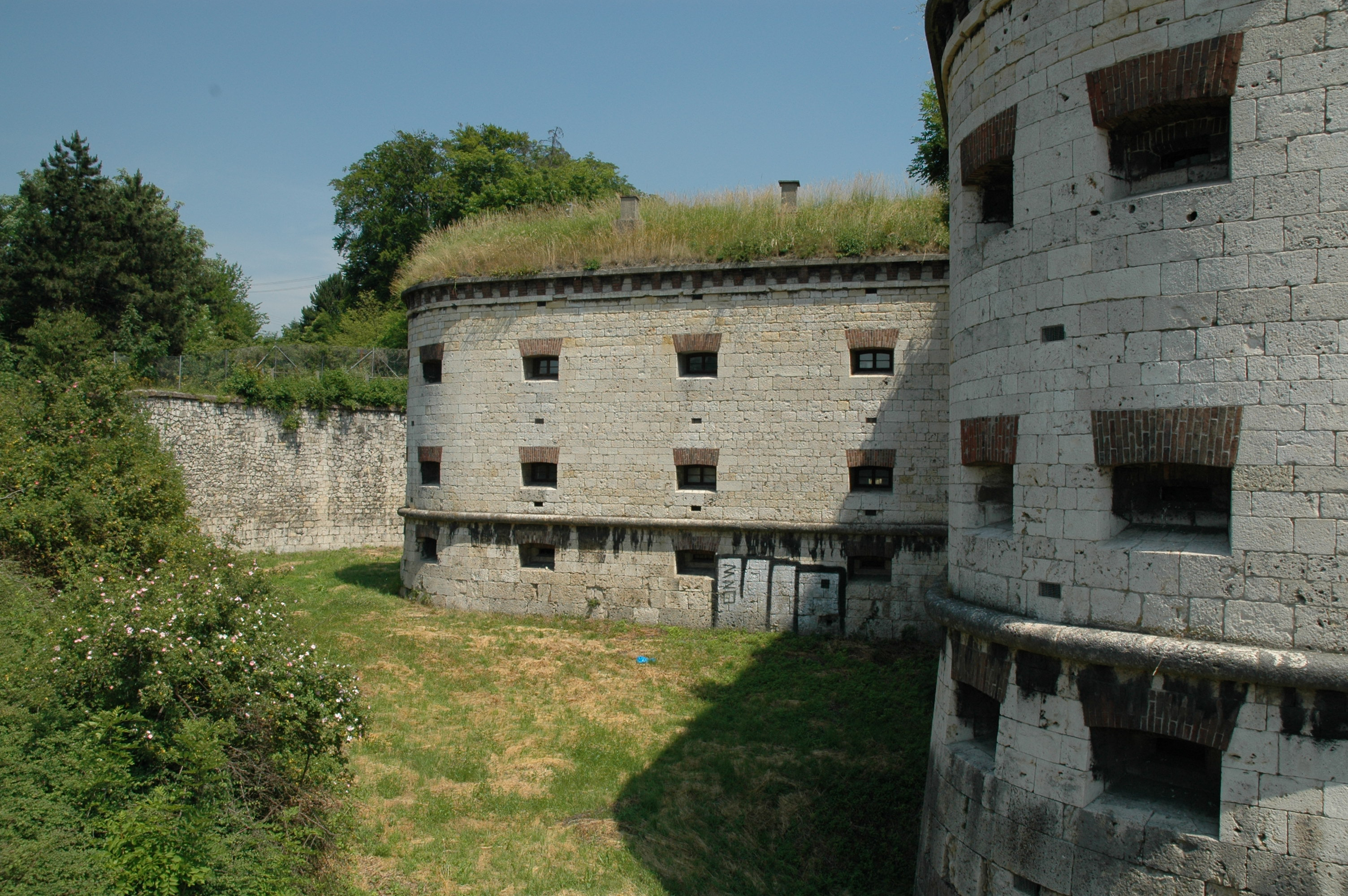 Kienlesbergbastion Doppelkaponniere eigenes Foto Peter Weller 2005